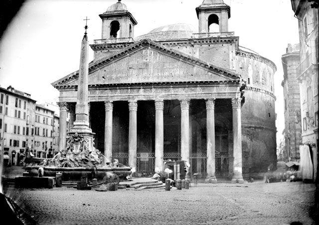 Fonds Trutat - Photographie ancienne Cote : TRU C 2773 Localisation : Fonds ancien (S 30) Original non communicable Titre : Façade du Panthéon, Rome Auteur : Trutat, Eugène Rôle de l’auteur : Photographe Lieu de création : Rome (Latium) Date de création : 1859-1910 [entre] Mesures : : 9 x 13 cm Observations : Note manuscrite de Trutat : " Rome, Panthéon ". Mot(s)-clé(s) : -- Eglise -- Façade -- Colonnade -- Fronton -- Chapiteau -- Entablement -- Clocher -- Coupole -- Fontaine -- Décor d'architecture -- Sculpture -- Obélisque monumental -- Place -- Vestiges -- Rome (Latium) -- Latium (Italie) -- Italie -- Le Panthéon (Rome) -- 19e siècle, 2e moitié -- 20e siècle, 1e quart -- Epoque romaine Médium : Photographies -- Négatifs sur plaque de verre -- Noir et blanc -- Vues d'architecture -- Collodion albuminé Bibliothèque de Toulouse. Domaine public